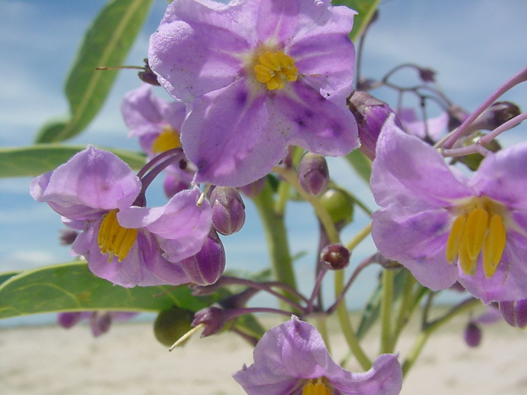 Solanum glaucophyllum - SOLANACEAE - Lagoa Mirim - Taim - RS - Brasil